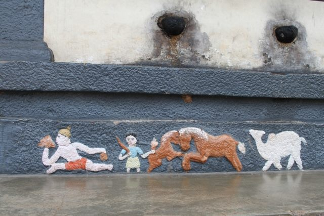 പഴയ സുറിയാനി പള്ളിയുടെ നടപ്പന്തലിലുള്ള ഹനുമാന്റെ ചുമർചിത്രം.